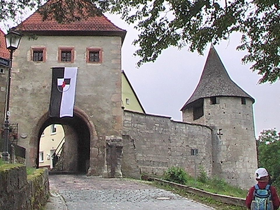 Stadttor mit Malefizturm von Creußen